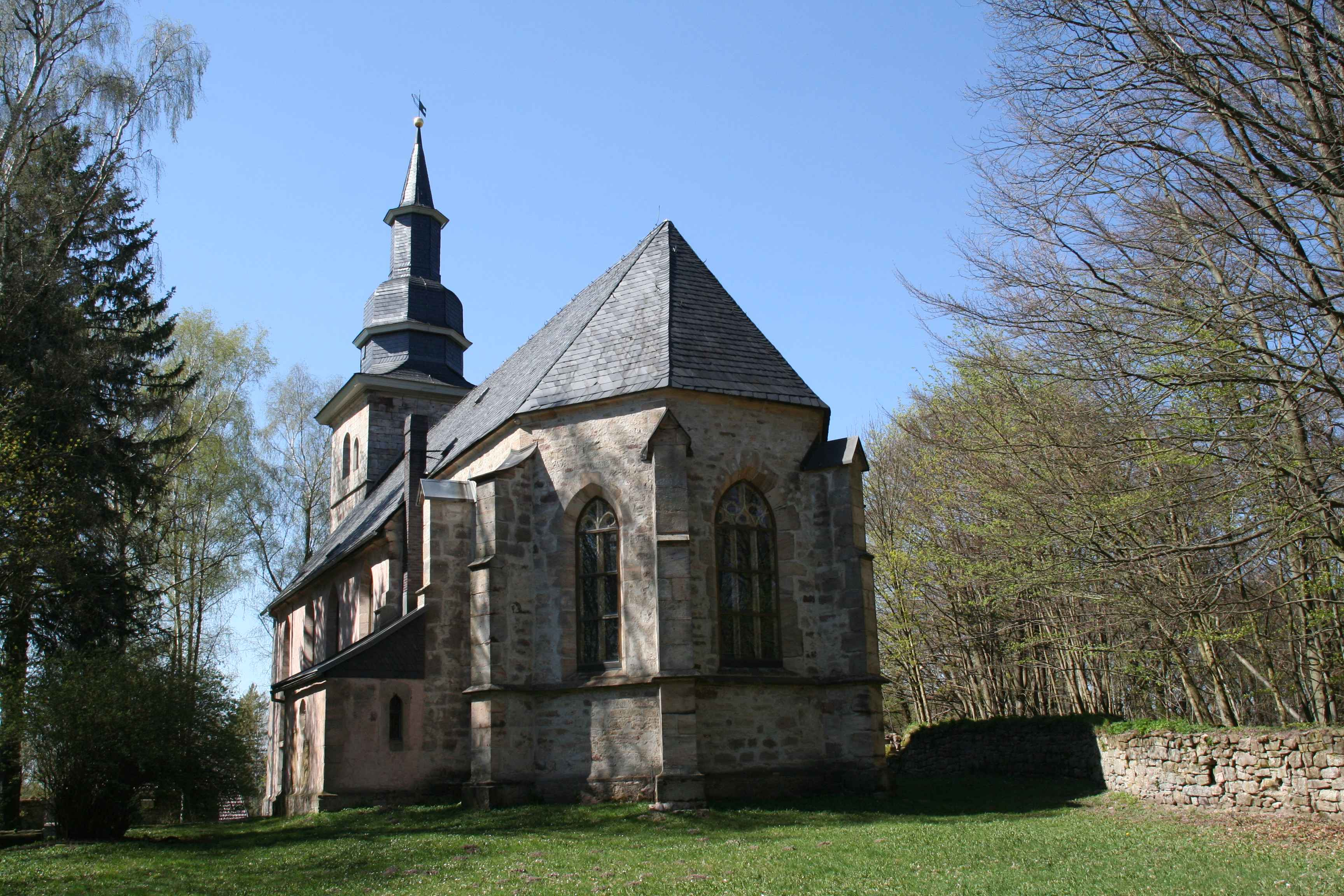 ev. Kirche St. Veits evangelische Kirche in Crock, Landkreis Hildburghausen